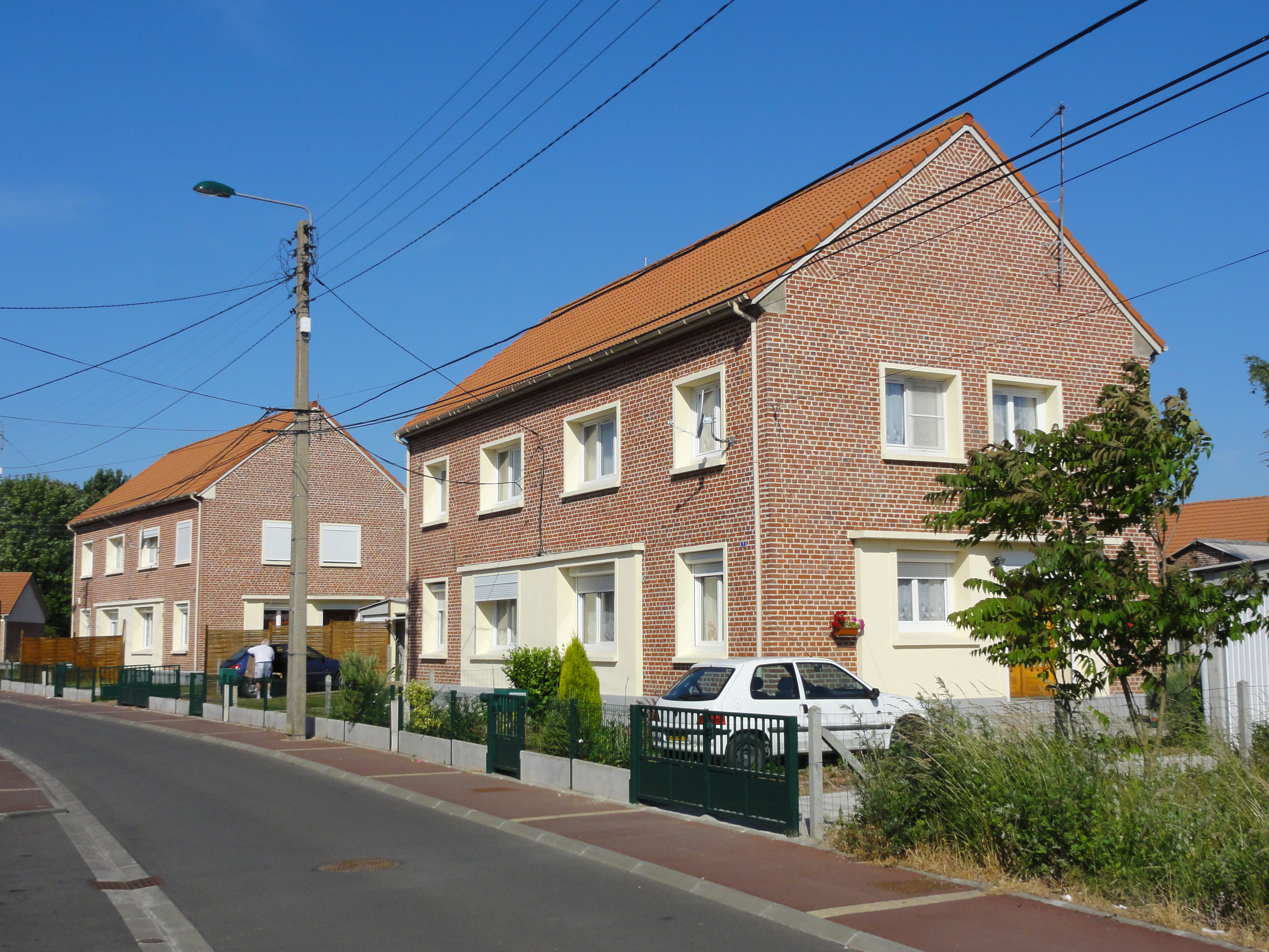 Cité du Grand Condé de la fosse n° 2 - 2 bis de la Compagnie des mines de Lens dans le bassin minier du Nord-Pas-de-Calais, Lens, Pas-de-Calais, Nord-Pas-de-Calais, France.